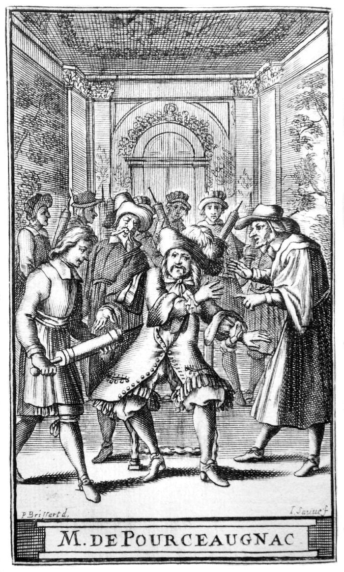 Moliere, 'Monsieur de Pourceaugnac', acte I, sc. 8